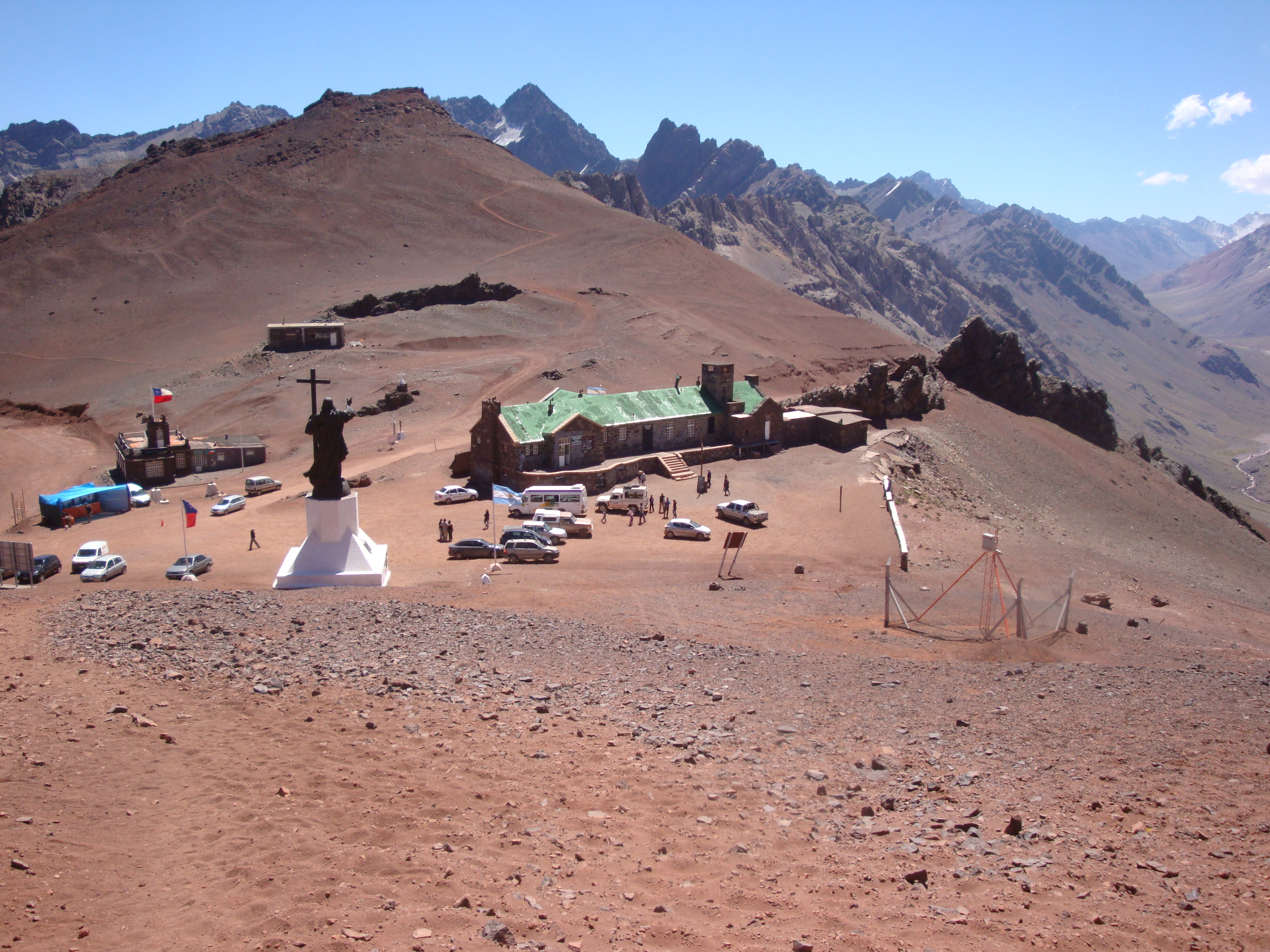 Monumento del Cristo Redentor y edificaciones chilena (izquierda) y argentina (derecha) en el Paso del Bermejo.